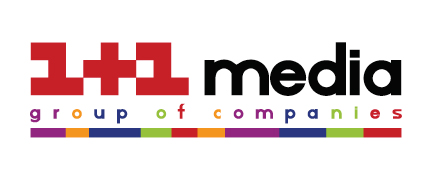 1+1 медіа – один з найбільших медіа-холдингів України